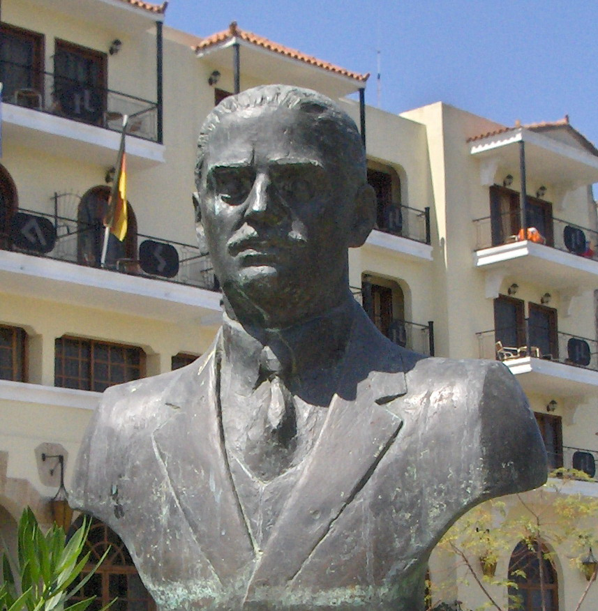 Δημήτριος Γολέμης, αθλητής (1877 - ;), χάλκινος Ολυμπιονίκης το 1896, στα 800 μ.